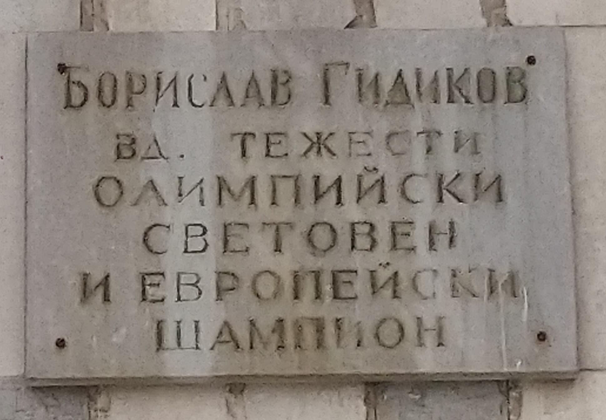 Паметна плоча на спортиста Борислав Гидиков (вдигане на тежести) на фасадата на спортна зала "Васил Левски", Пазарджик